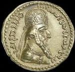 Pièce du règne de Ardashir Ier